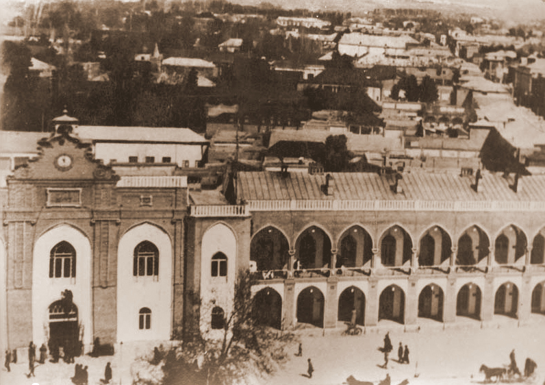 ساختمان پیشین شهرداری تهران در میدان توپخانه ر دهه 1310